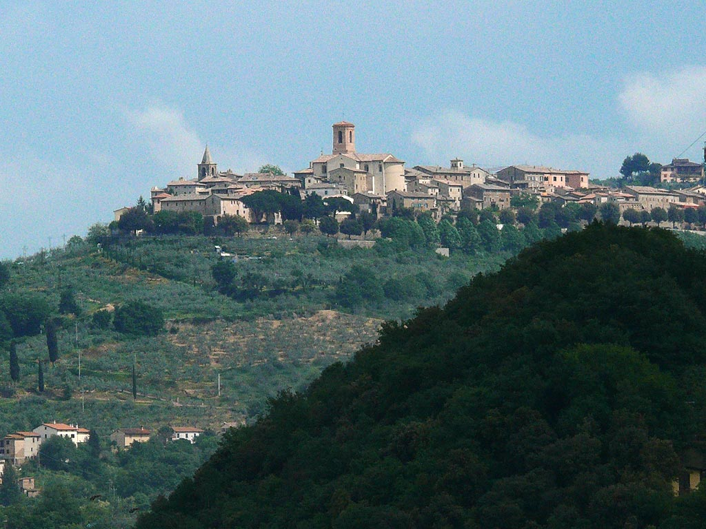 Bettona, view